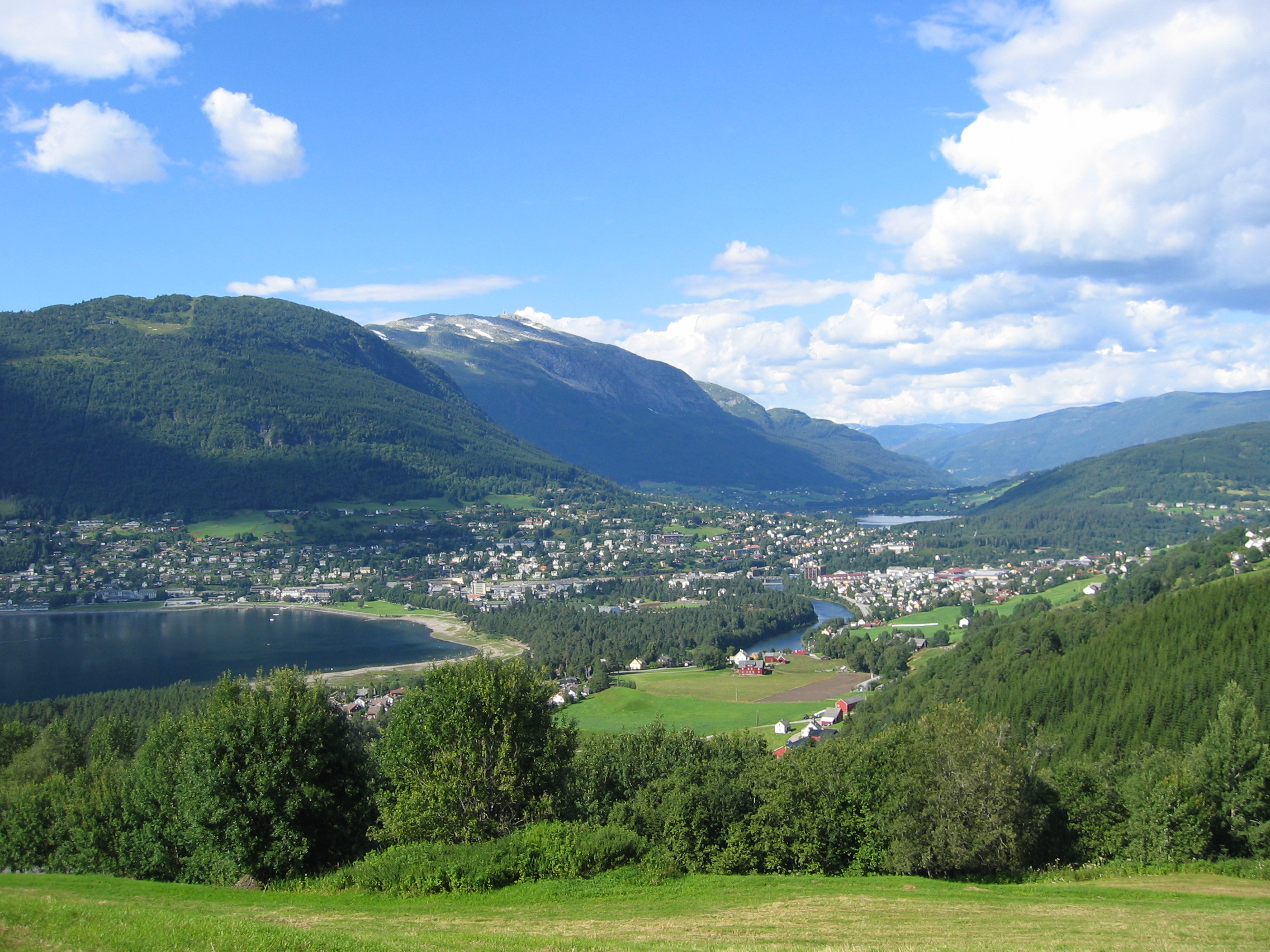 Austenden av Vangsvatnet, Vossavangen, elva er Voss. Utsyn nordover.